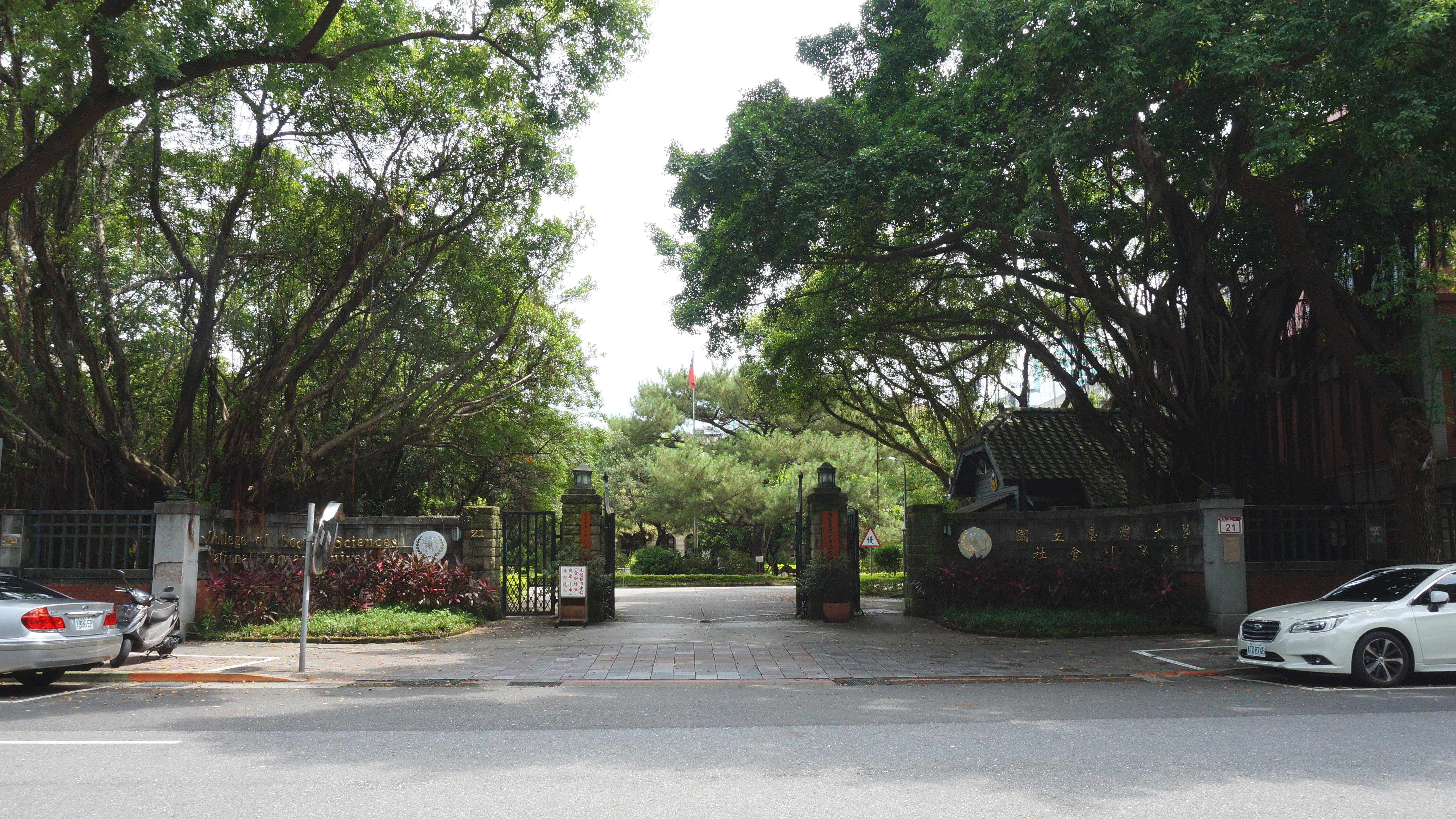 中文（台灣）: 國立臺灣大學社會科學院原院區正門，地址：臺北市中正區徐州路21號。